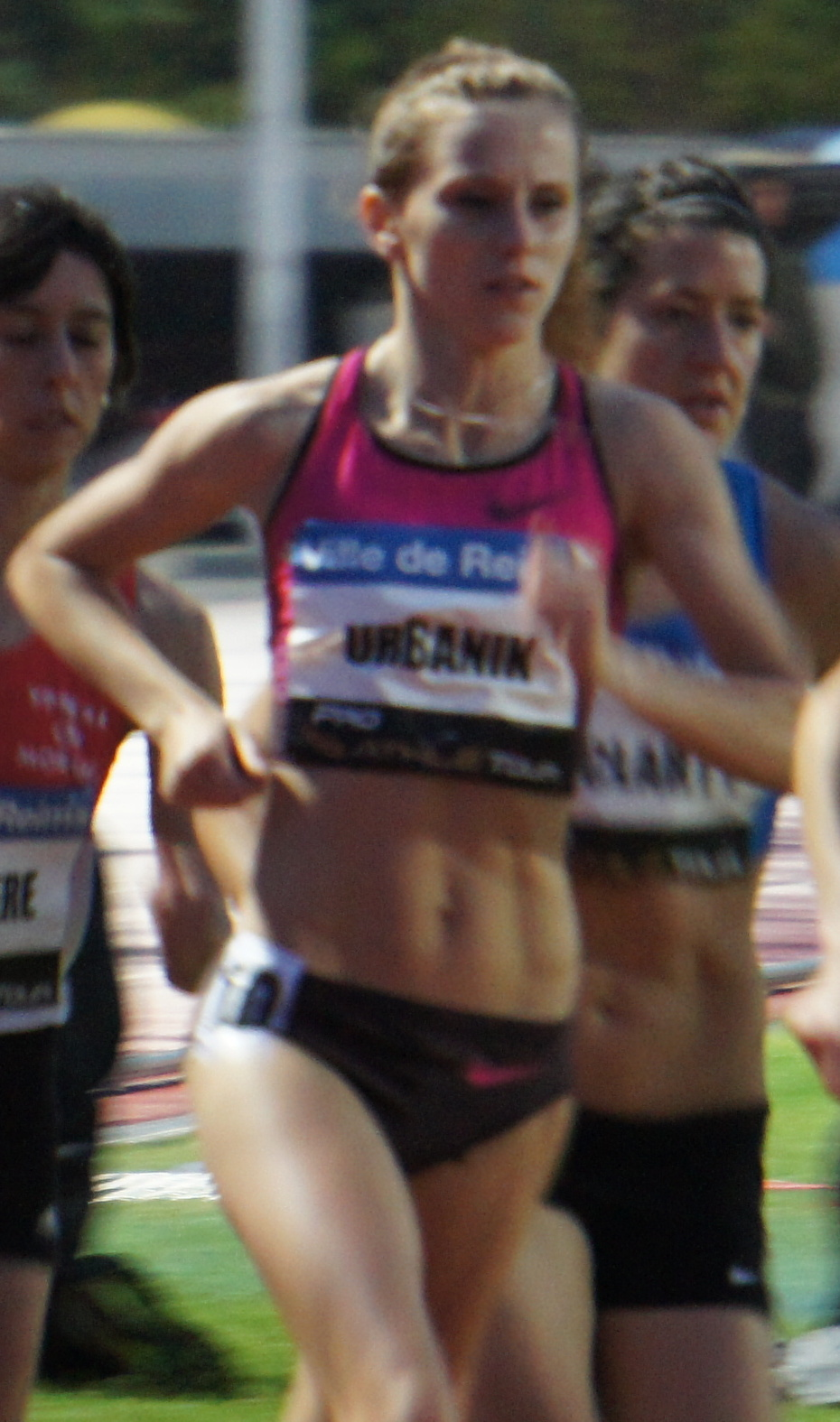 1 500 m féminin lors des Rencontres d'athlétisme de Reims 2013: Danuta Urbanik.